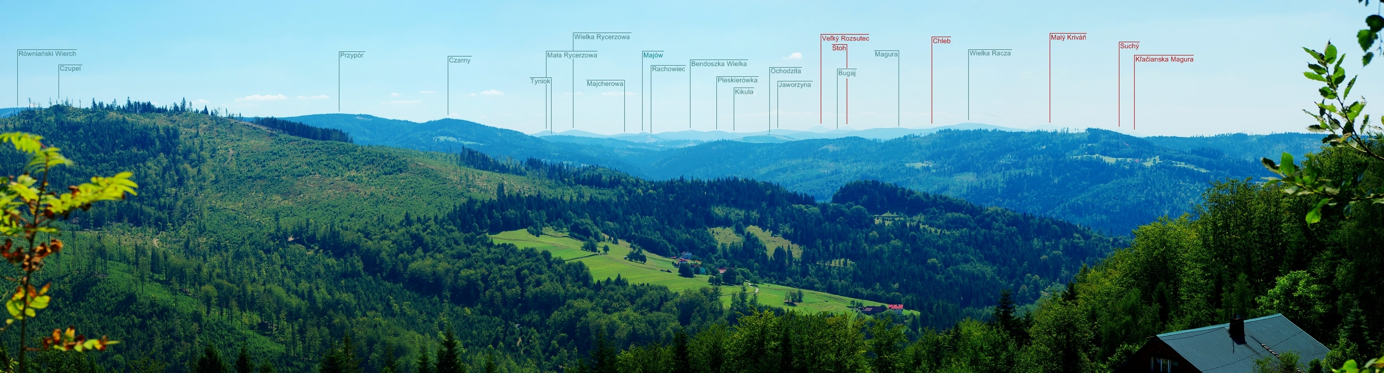 Panorama na Beskidy i Krywańską Małą Fatrę z Kamiennego w Beskidzie Śląskim.